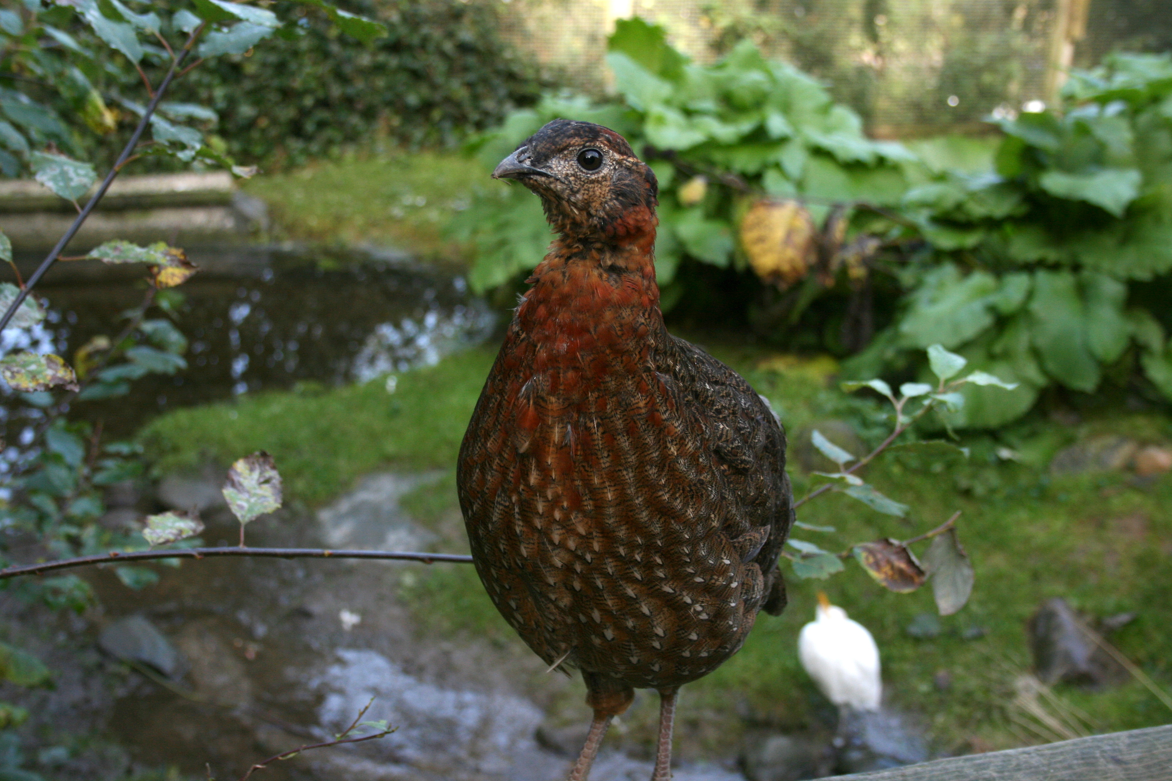 Tragopan satyra im Affen- und Vogelpark in Reichshof-Eckenhagen: junges Männchen / young male